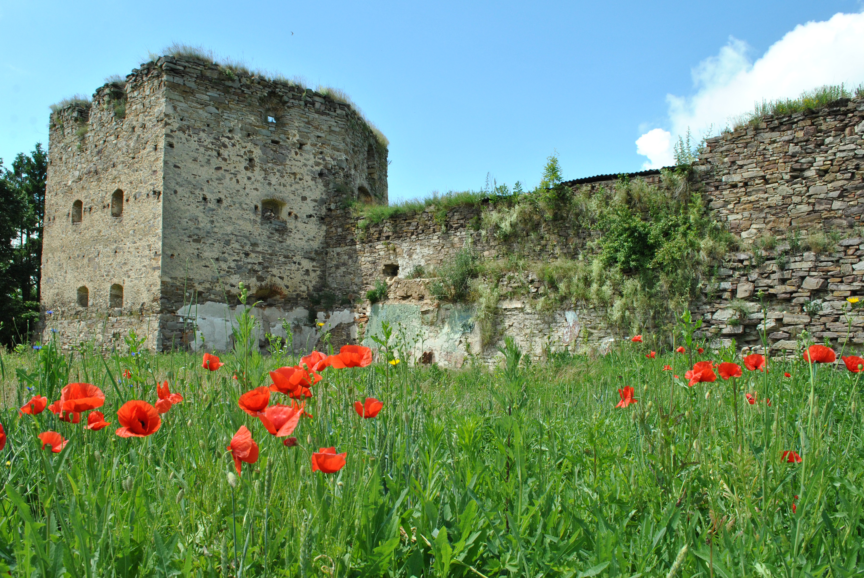 Замок (мур.), смт Золотий Потік Бучацького району Тернопільської області.